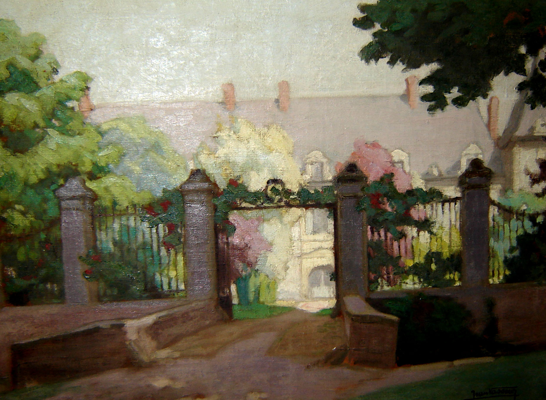 Tableau de Louis-Jean-Baptiste VASSEUR (vers 1826 - vers 1889) : Les grilles du château de Thoix (Somme) Collection du Musée Alfred-Danicourt / Ville de Péronne (Somme) (Numéro d'inventaire 1933.K.110) Fichier aimablement communiqué par le Musée Alfred-Danicourt/Ville de Péronne